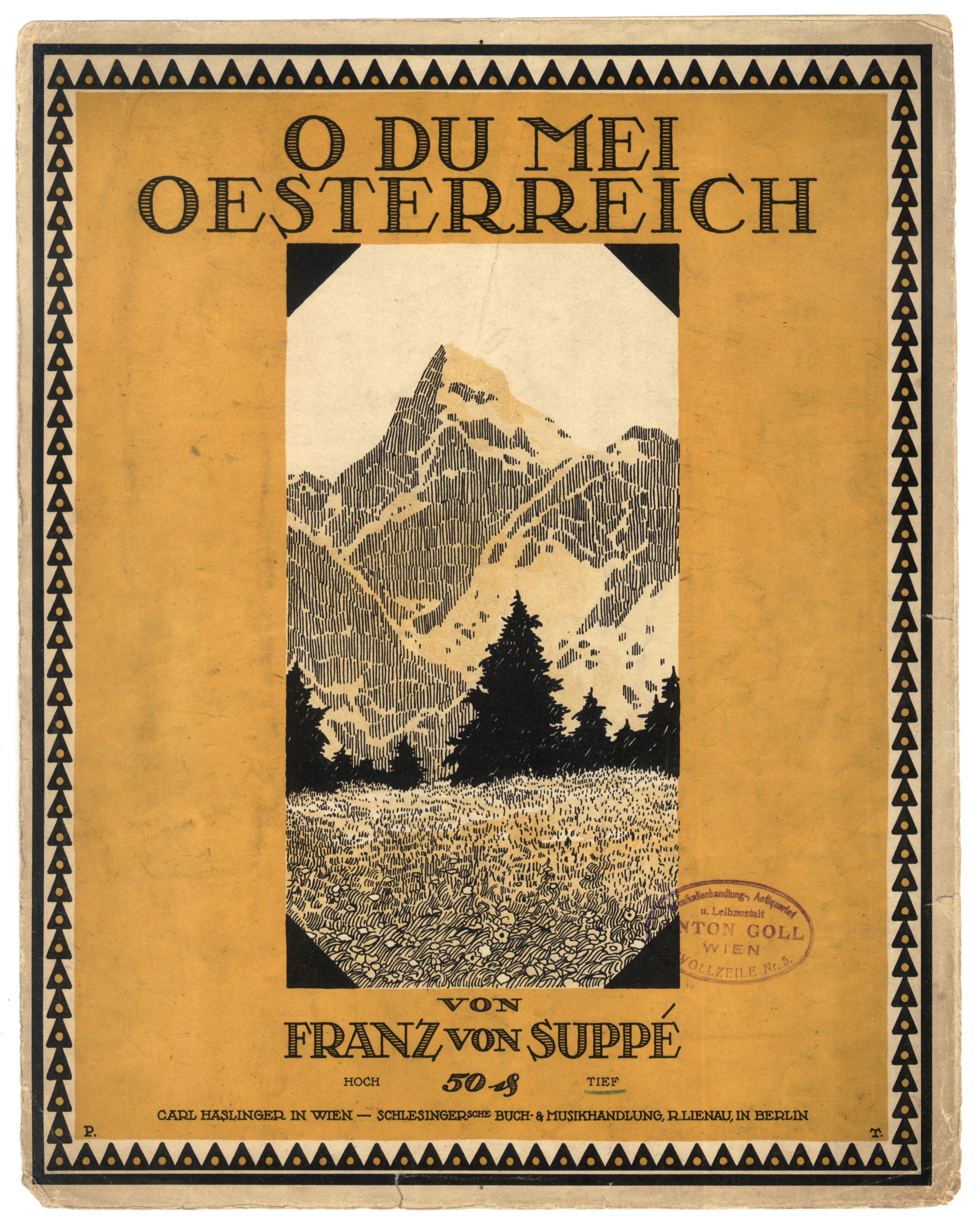 Franz von Suppe: O du mei Oesterreich